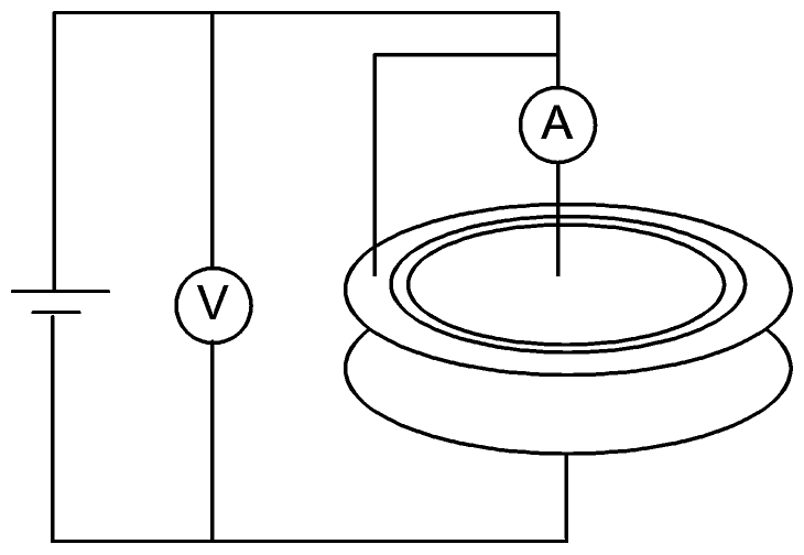 Messschaltung mit Schutzringkondensator zur Isolierstoffprüfung